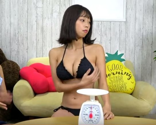 シャベチャン【sherbetchannel】青山ひかる